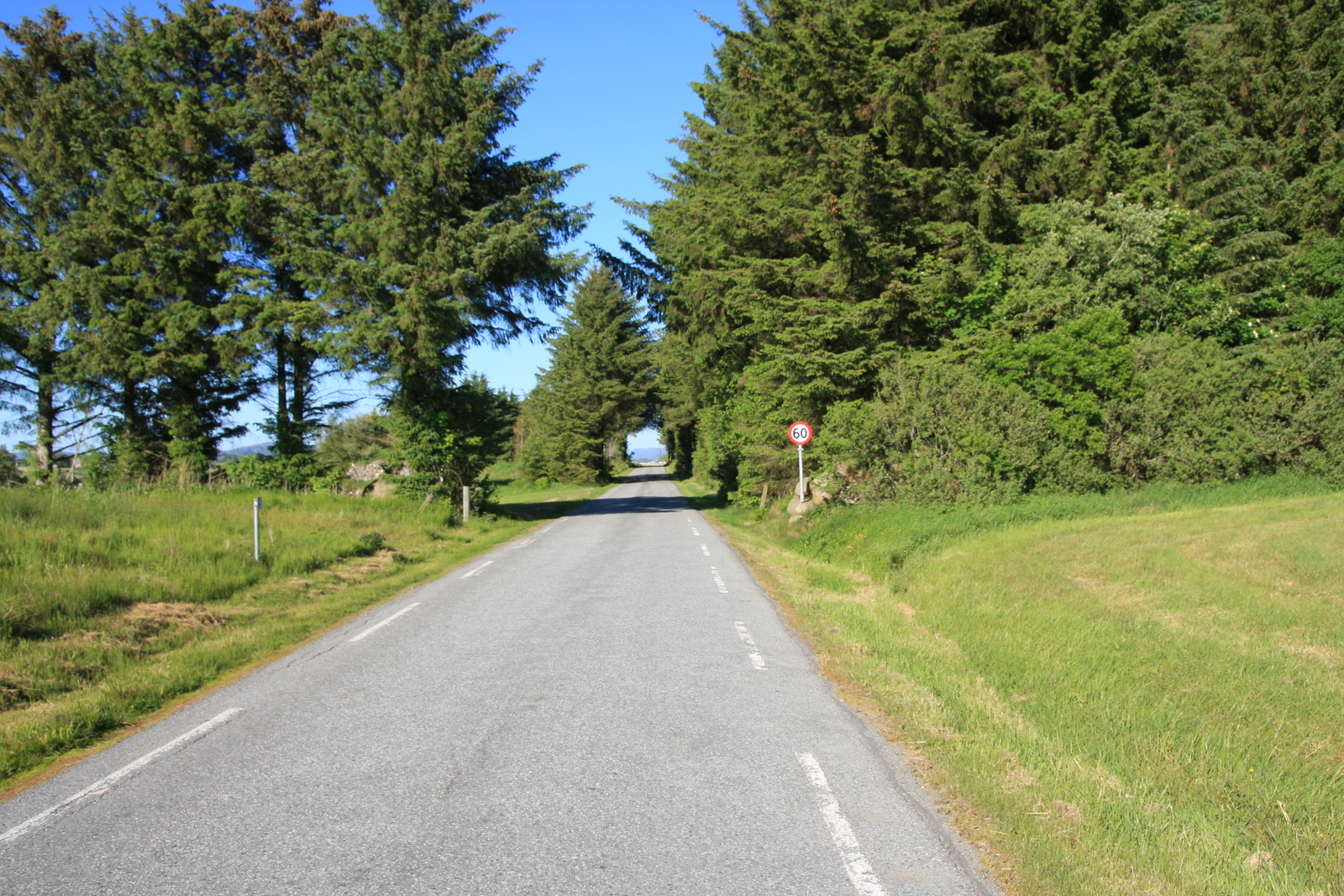 Fylkesvei 321 Todnheimveien